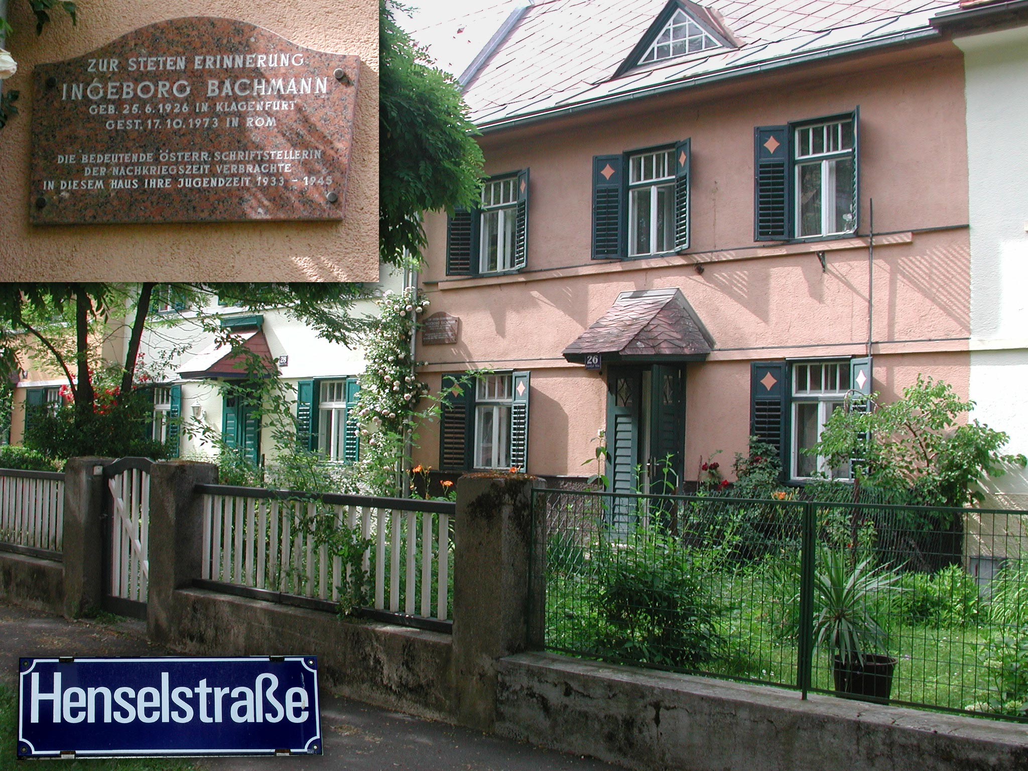 "Eines Tages ziehen die Kinder um in die Henselstraße. In ein Haus ohne Hausherr, in eine Siedlung, die unter Hypotheken zahm und engherzig ausgekrochen ist ... Sie sind Besitzer eines Gartens geworden, in dem vorne Rosen gepflanzt werden ..." (Ingeborg Bachmann: Jugend in einer österreichischen Stadt, S.87 In: I.B. Werke, Bd.2 Erzählungen, München-Zürich, Piper 1993)